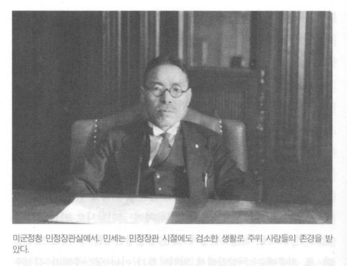 1946년, 한국의 미군정기 통치 당시 민정장관 활동했던 민세 안재홍.